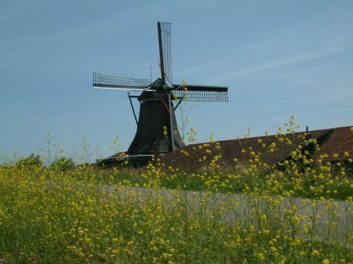 papier molen de Schoolmeester te Westzaan (eigen foto)